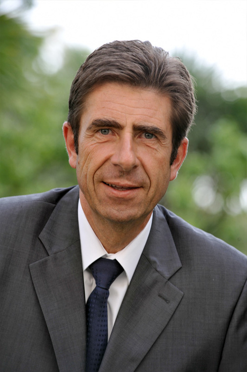 Charles Ange Ginesy, député des Alpes-Maritimes, Maire de Péone-Valberg